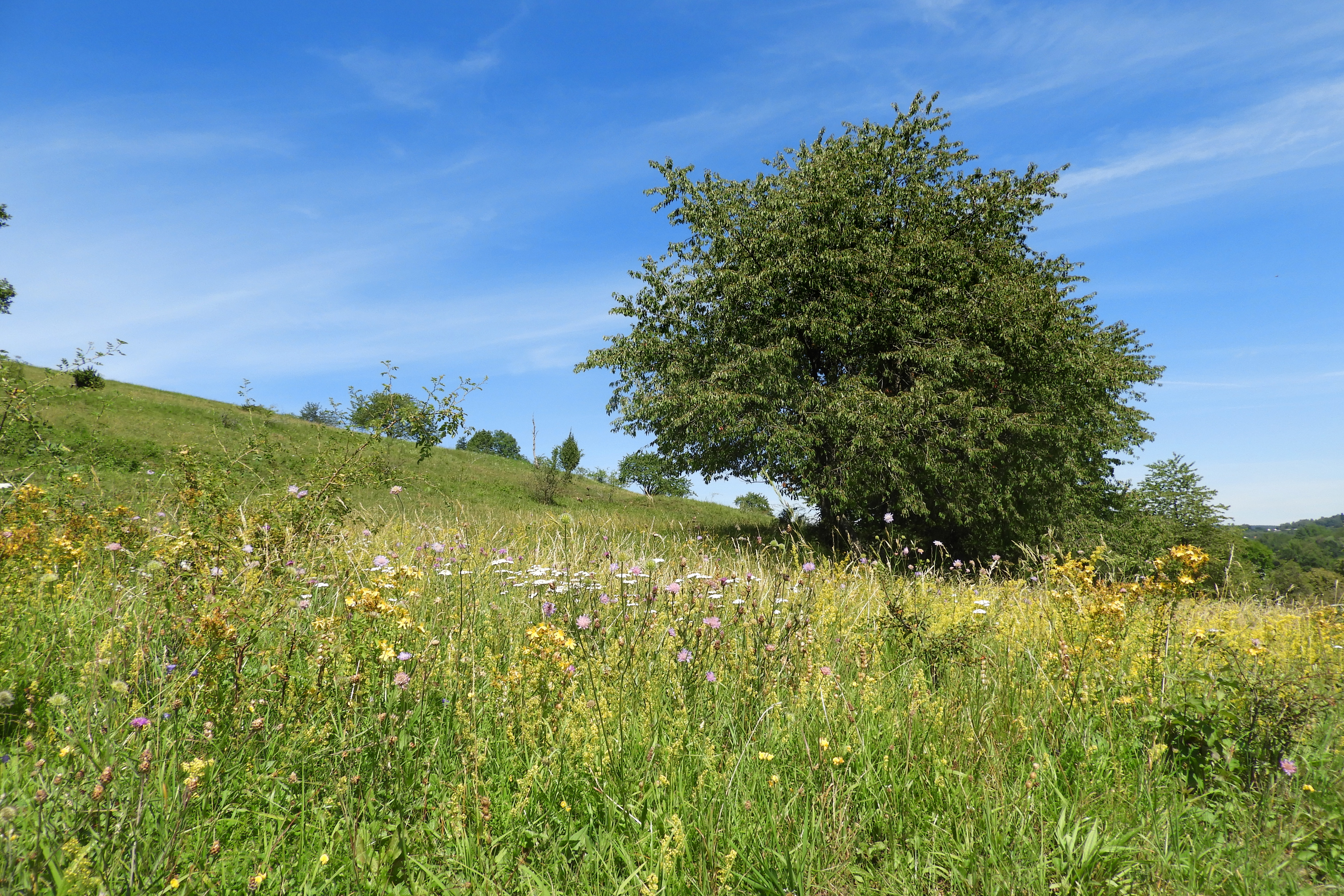 Der Rösberg erhebt sich mit einer Höhe von 539,4 m aus der Mittelgebirgslandschaft des Kaufunger Waldes, südöstlich von Rommerode, einem Ortsteil der Stadt Großalmerode im nordhessischen Werra-Meißner-Kreis. Er wird geprägt von Kalkmagerrasen, Wirtschaftsgrünland, Äckern und Wäldern, die sich kleinräumig miteinander abwechseln und ein vielgestaltiges Landschaftsbild ergeben. Wegen dem Vorkommen von besonders schutzwürdigen Tier- und Pflanzenarten auf seinen Grünlandflächen, wurde er als ein Flora-Fauna-Habitat-Gebiet zu einem Bestandteil des europaweiten Schutzgebietssystems Natura 2000, das eine länderübergreifende Vernetzung von bedrohten Lebensräumen zum Ziel hat. Auf den Halbtrockenrasen, die durch die Bewirtschaftung des Menschen entstanden sind, finden sich mehr als sechzig verschiedene Pflanzenarten, von denen viele als selten und gefährdet angesehen werden.